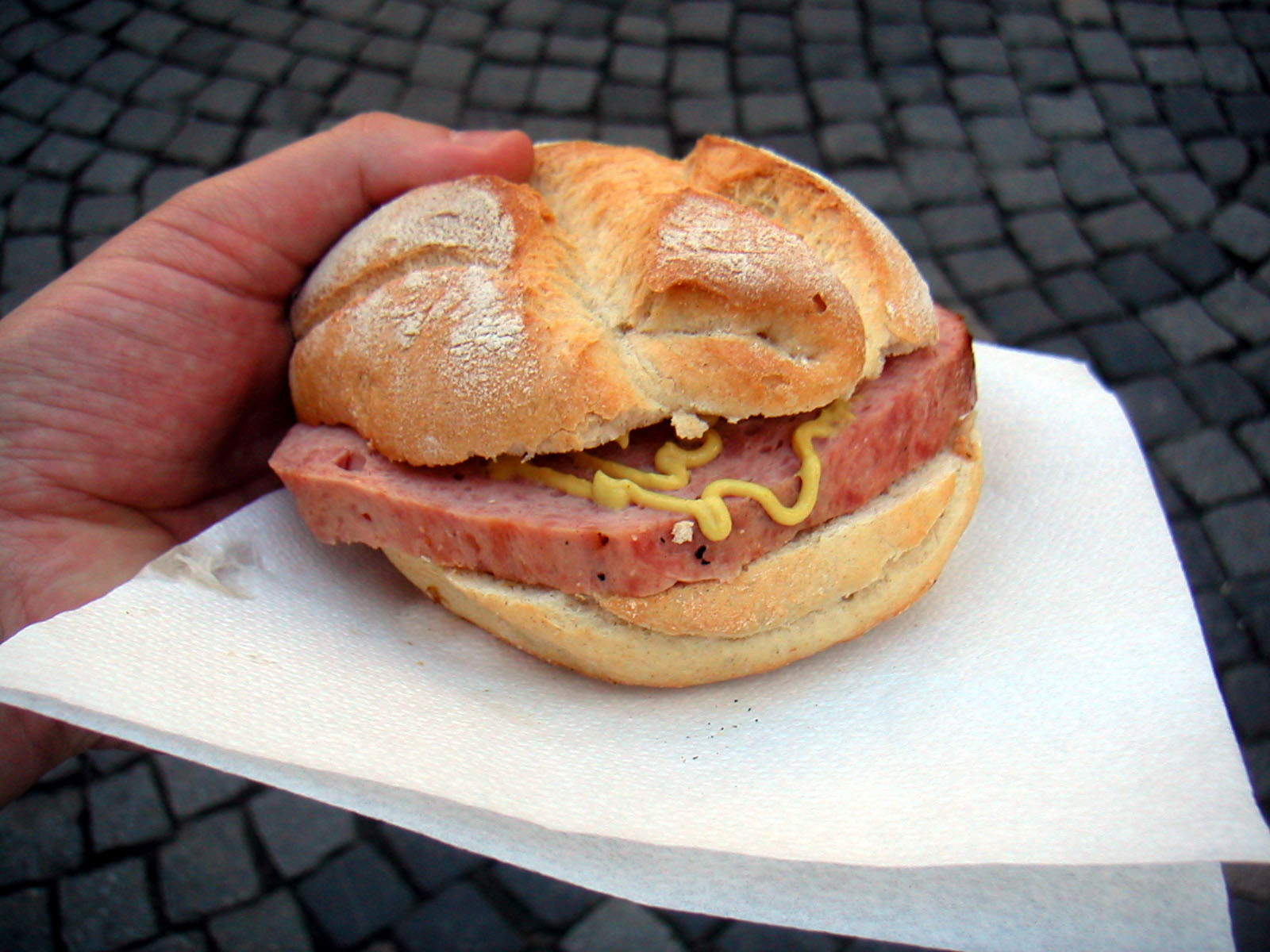 Fleischkäse